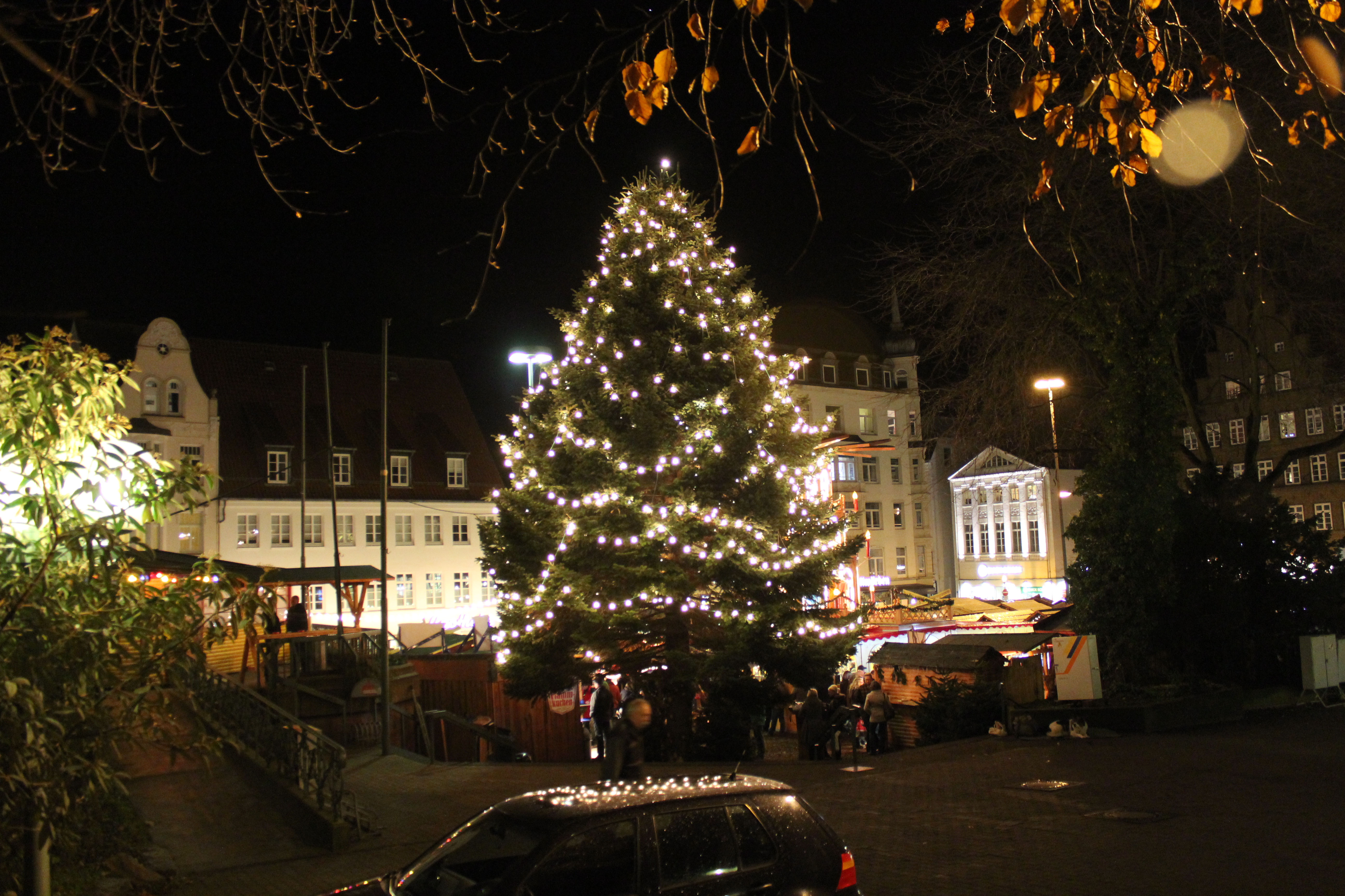 Weihnachtsmarkt 2011 Flensburg, Weihnachtsbaum auf dem Südermarkt